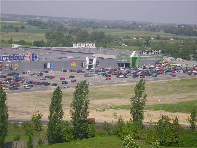 Leroy Merlin en Kalisz, Polonia